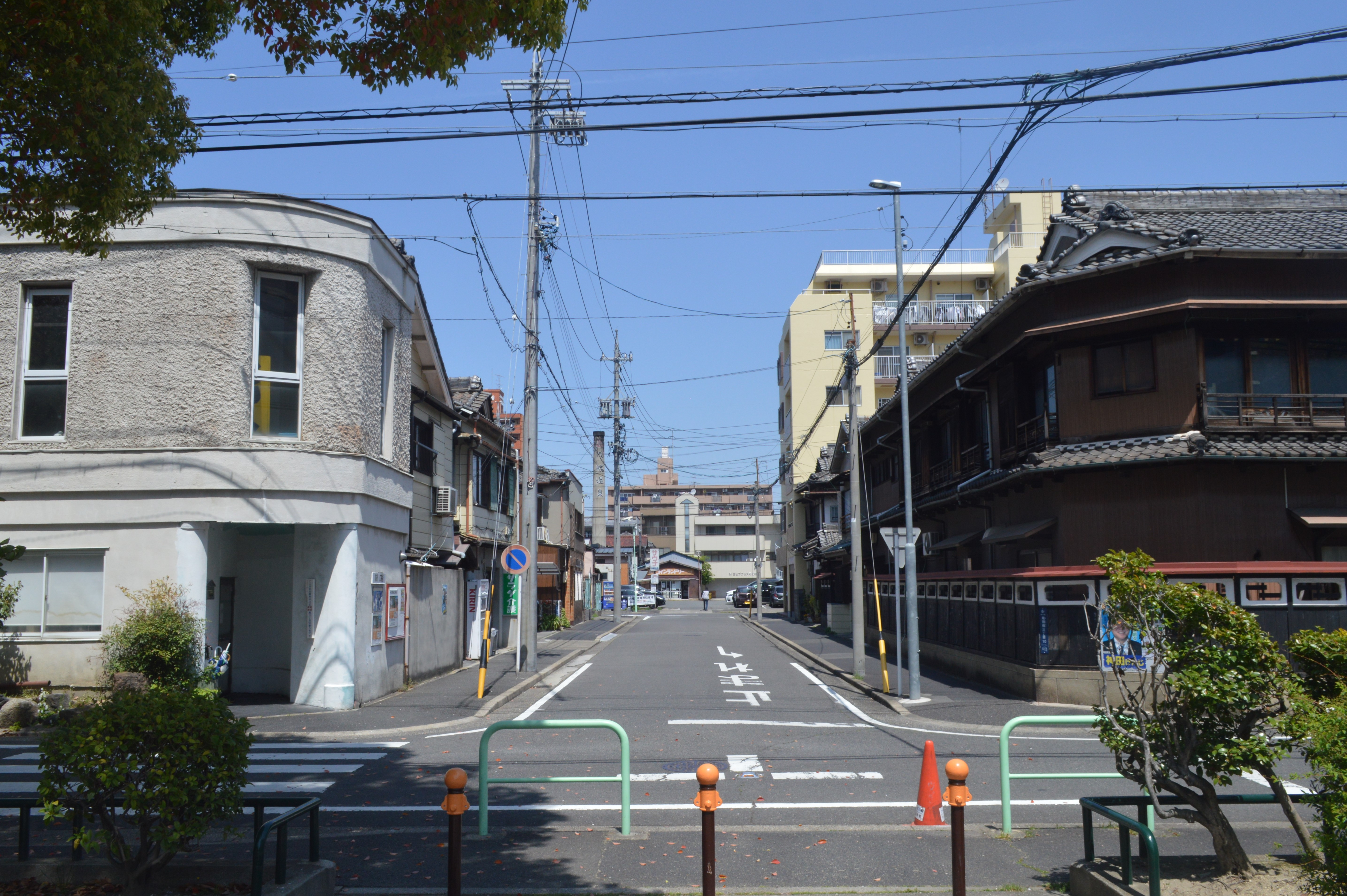 愛知県中川区尾頭橋にある尾頭橋公園から北を見る。遊郭「八幡園」跡。